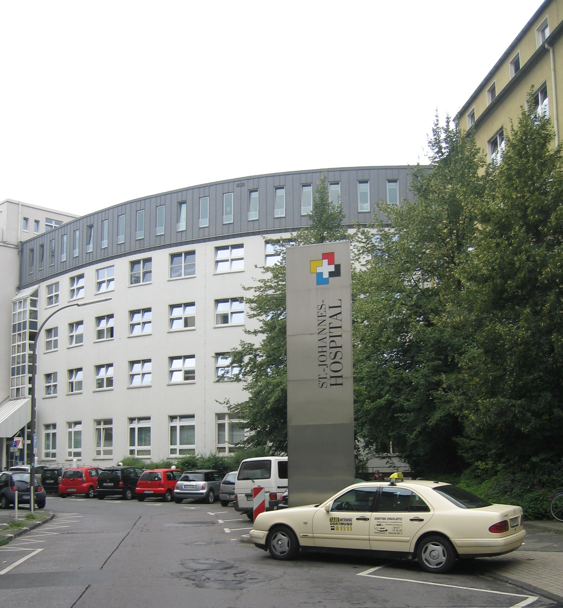 St.-Johannes-Hospital Dortmund Eigene Aufnahme August 2006